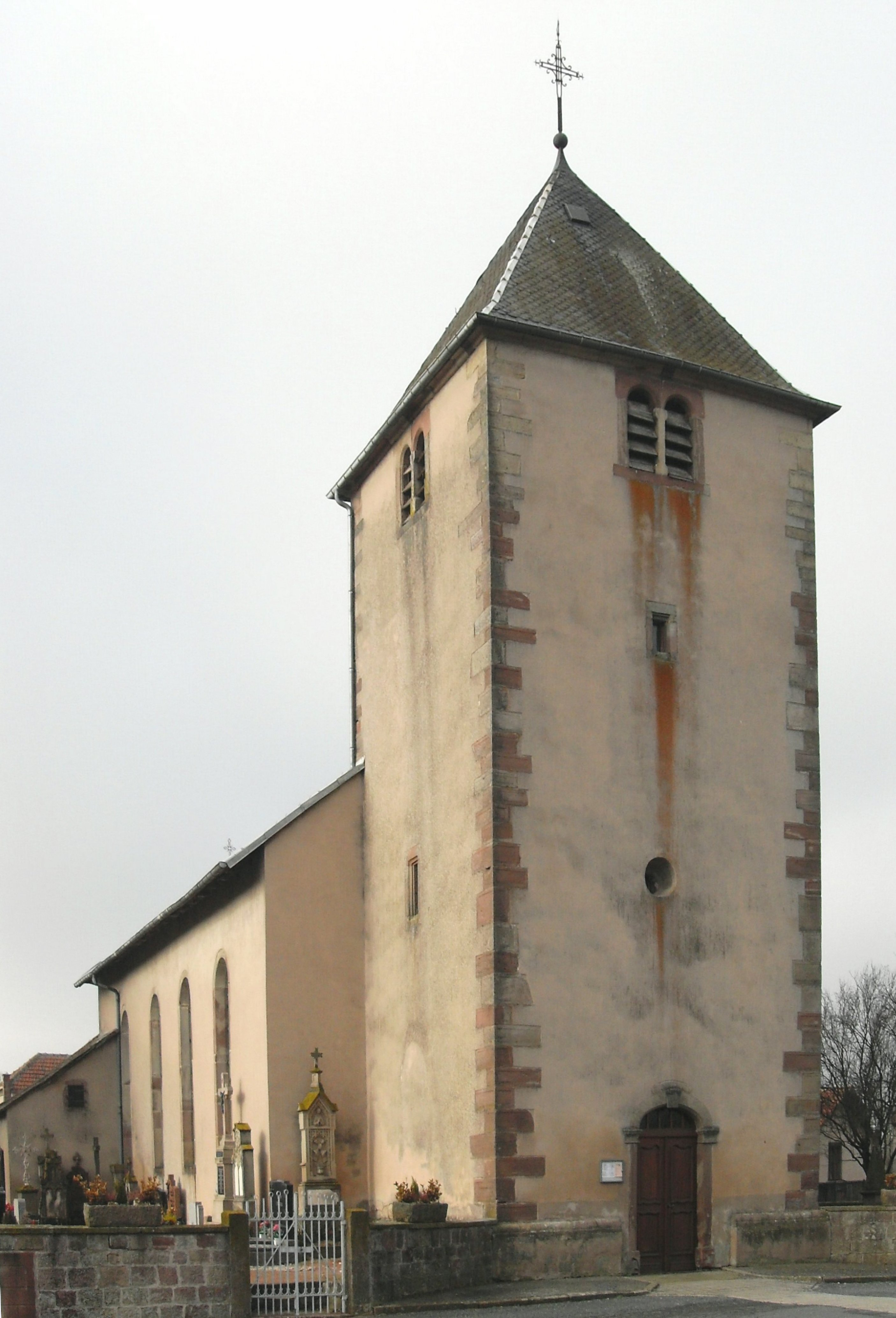 L'église Saint-Michel à Bourscheid